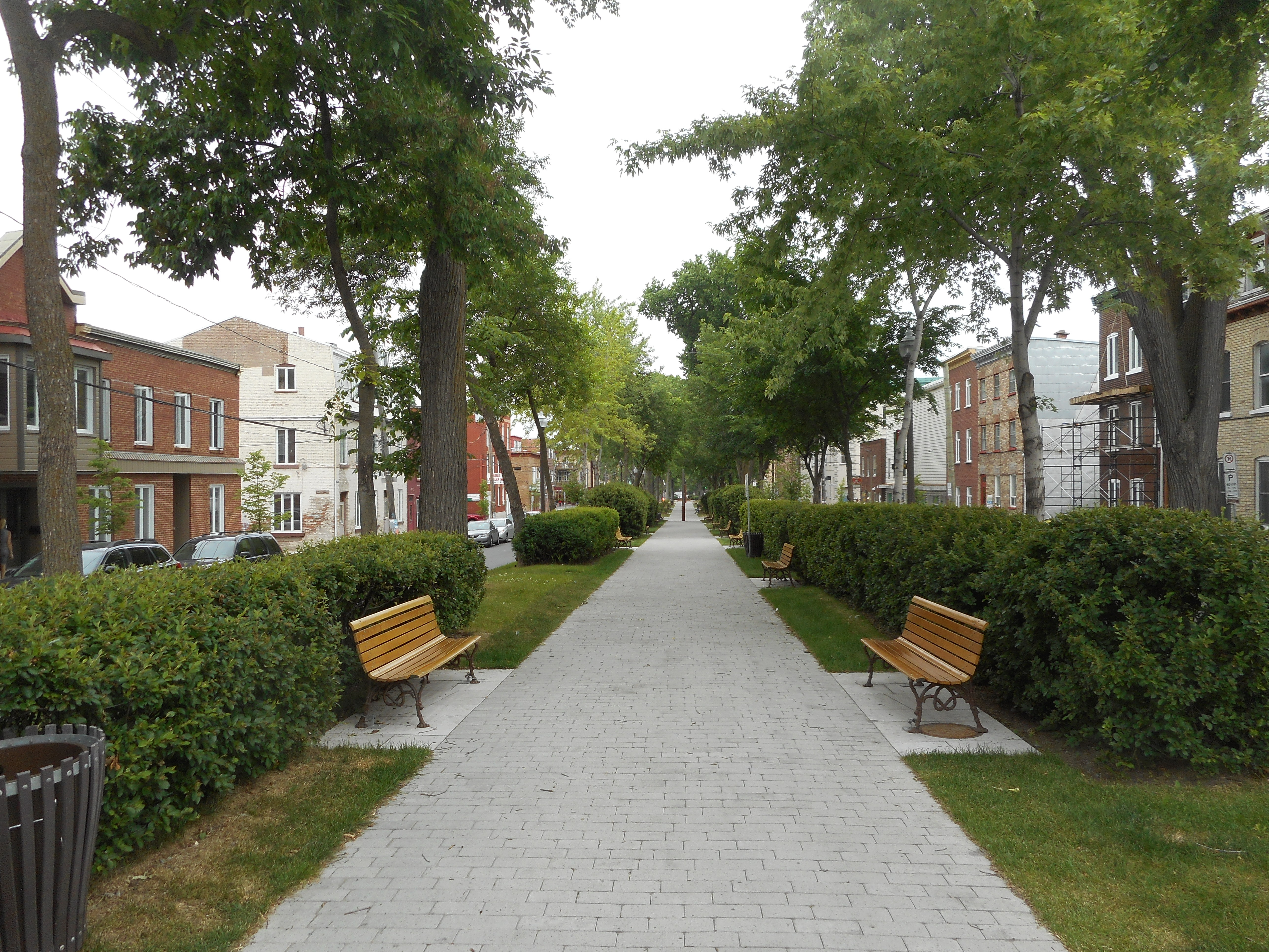 Parc du boulevard Langelier, Québec